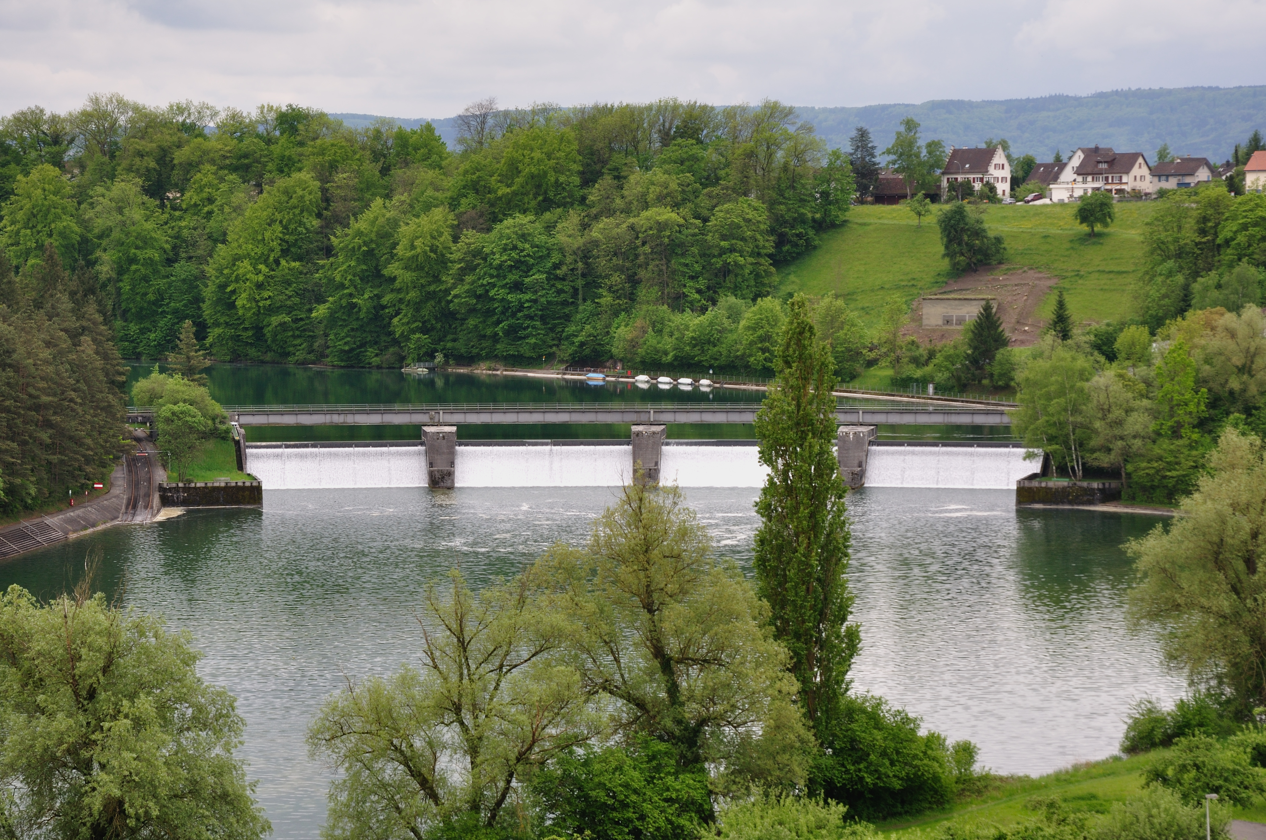 Switzerland, Canton of Zürich, Rhine dam in Rheinau: A5500 Infanteriebunker Korbwiese